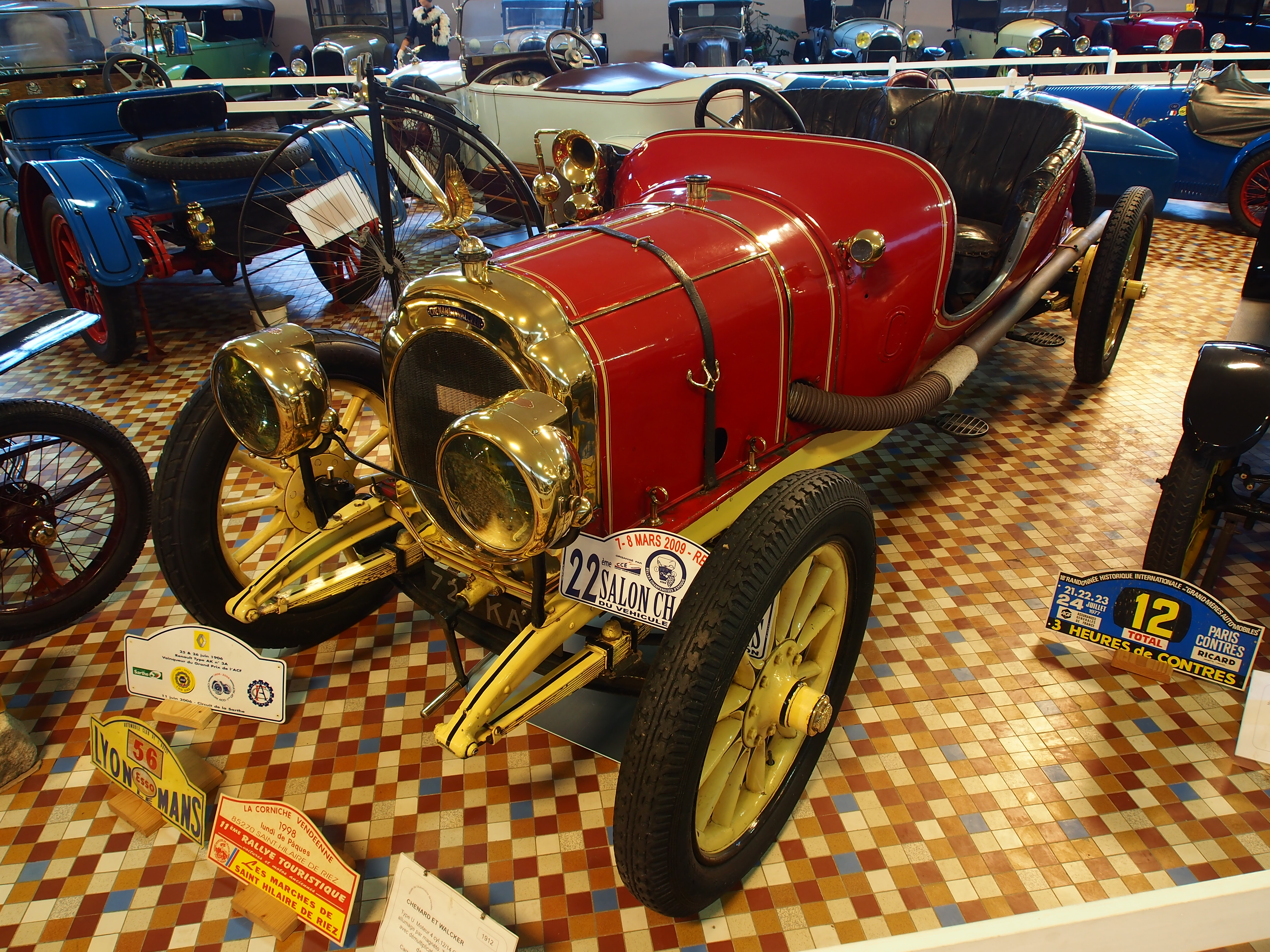 Photographed at the Musée Automobile de Vendée, France.